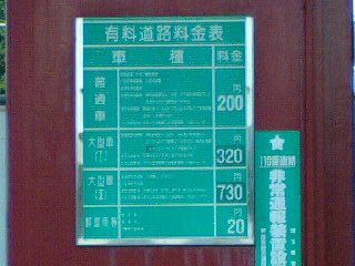 富士見市勝瀬・富士見川越有料道路料金所